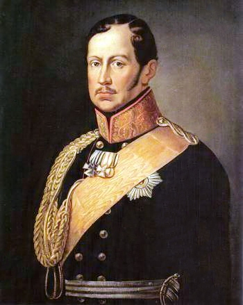 Frederic Willhelm III King of Prussia (1797-1840)label QS:Len,"Frederic Willhelm III King of Prussia (1797-1840)" label QS:Lde,"Friedrich Wilhelm III. - König von Preußen (1797-1840)."